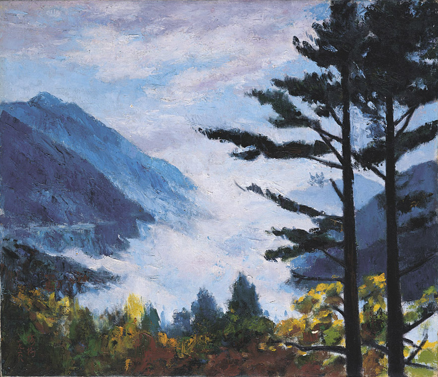 中文（台灣）: 描述台灣第一高山，登臨玉山後所作。1960七位畫家共同合作高山仰止。